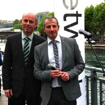 Network, Oliver Fritz président, Dominique Rachex responsable régional de Genève